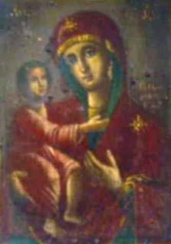 Музей: Свіслацкі гісторыка-краязнаўчы музей Тып: выяўленчыя крыніцы Від: жывапіс Прадметнае імя: абраз Назва/аўтарская назва: "Маці Божая" Матэрыялы: дошка; Тэхналогіі стварэння: алей; Дата стварэння: пачатак ХIХ (?) ст. Памеры: 14,3 х 19 см